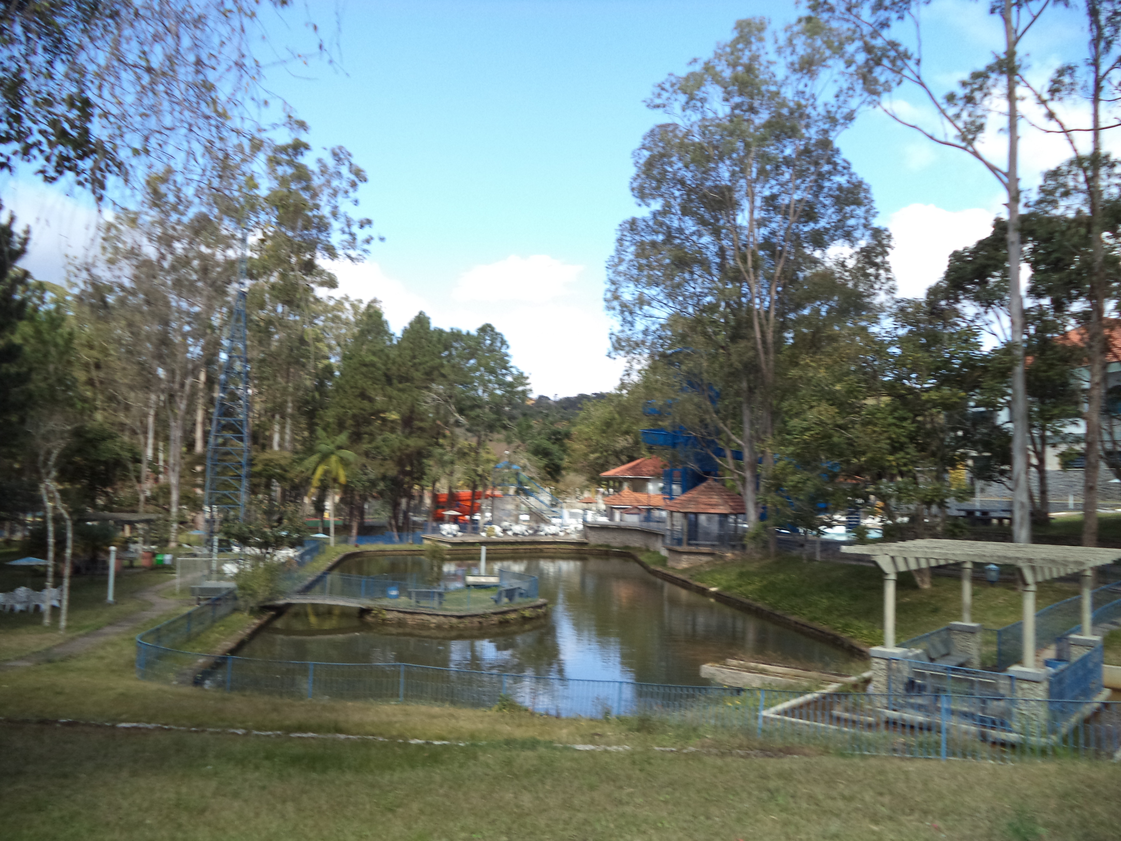 SESC de Juiz de Fora.